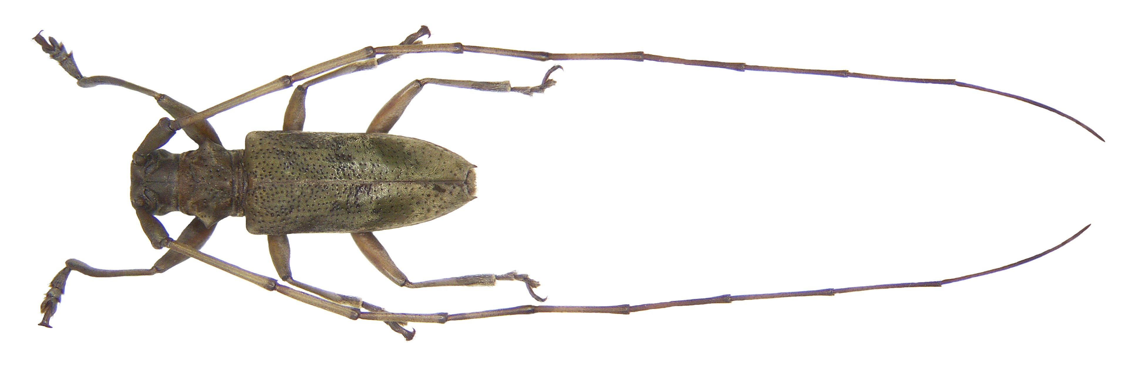 Familie: Cerambycidae Grösse: 12 mm Fundort: Indonesien, Sulawesi, Sawangan leg. A.Skale, 2004; det. A.Weigel Foto: U.Schmidt, 2007